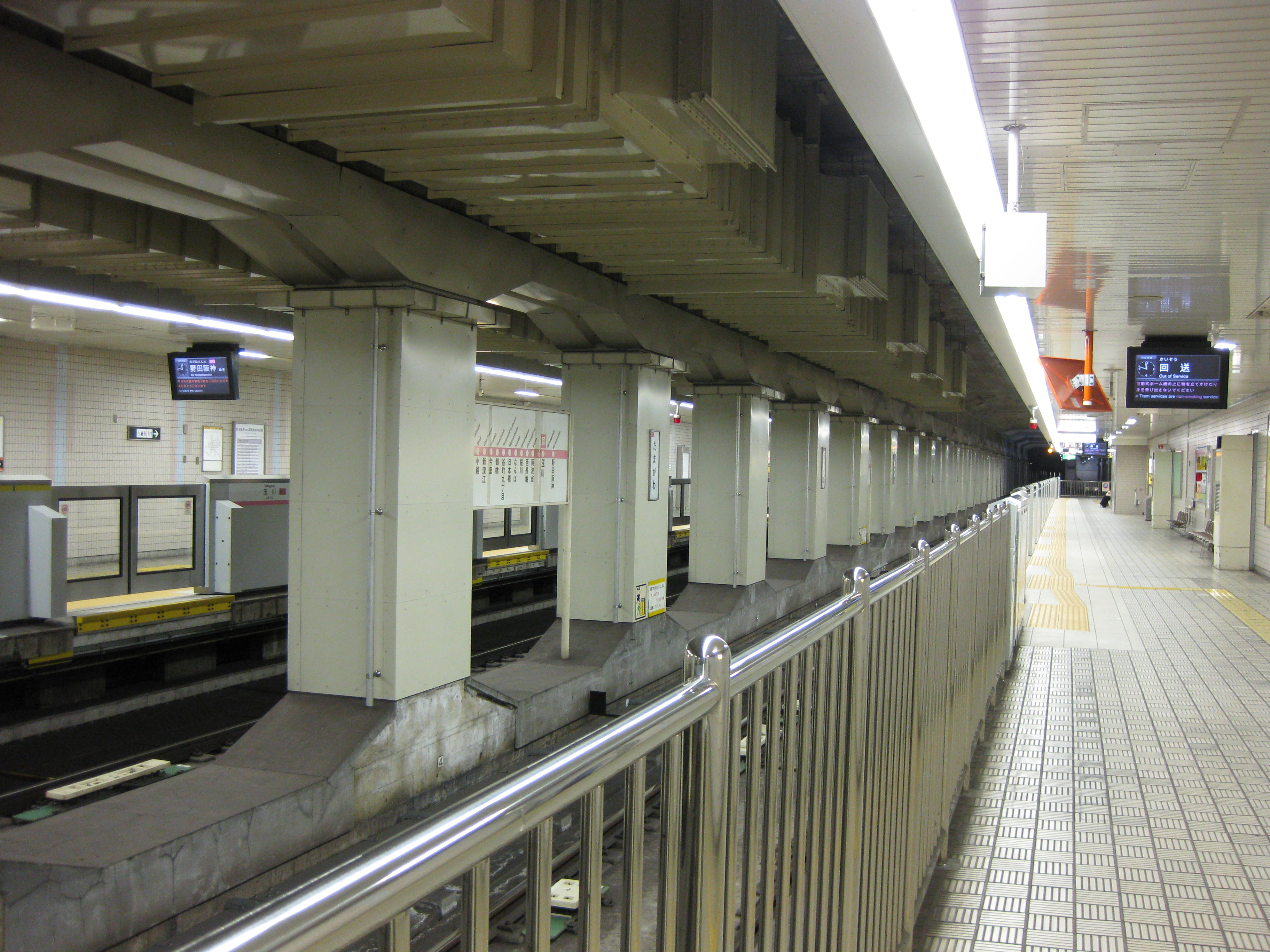 大阪市営地下鉄玉川駅プラットホーム